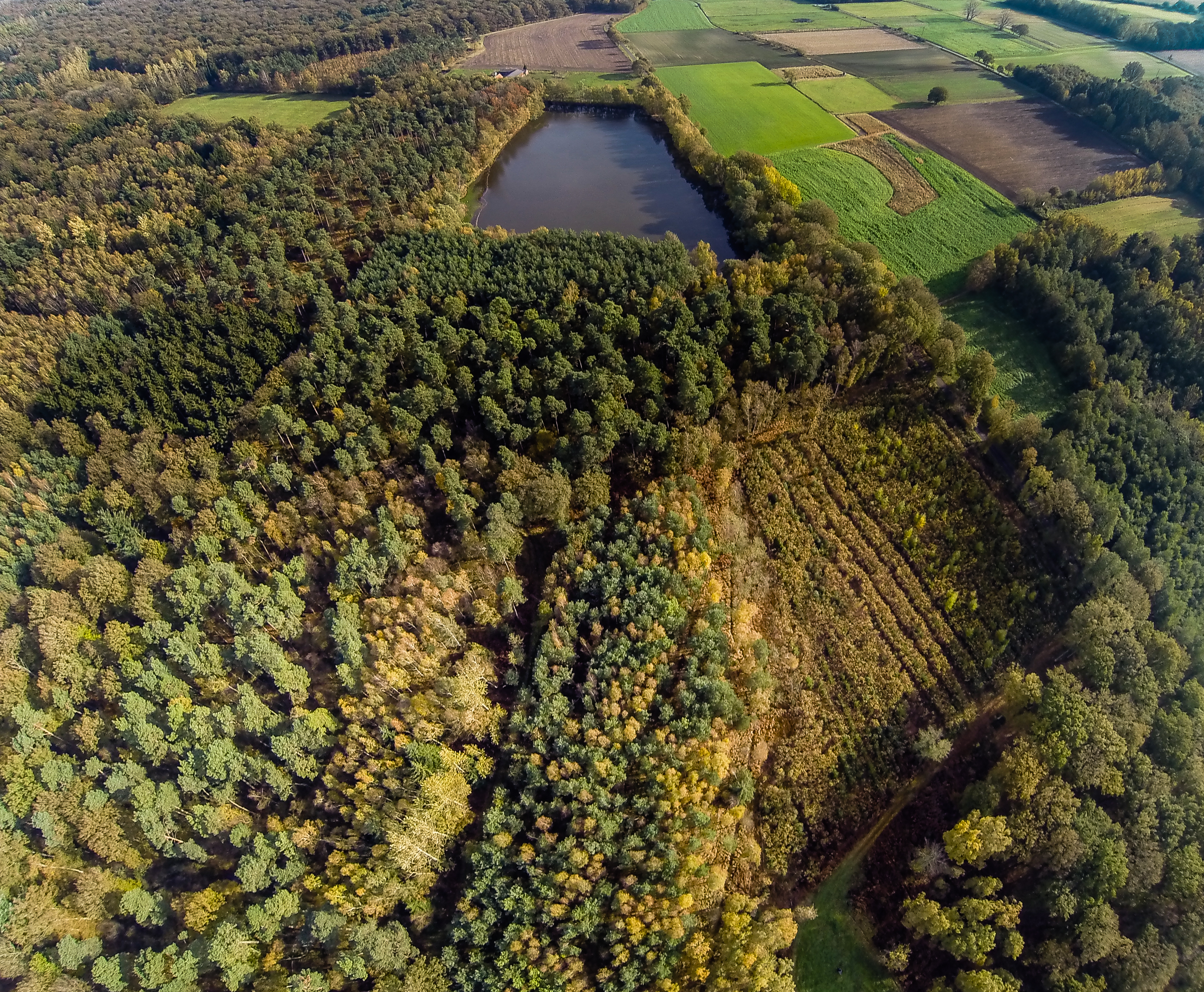 Südwestlicher Teil der Davert in der Sendener Gemarkung Ottmarsbocholt, Bereich Kreuzbauerschaft; Waldbereiche mit Saalmanns Teich im Naturschutzgebiet „Davert“ (NSG COE-023)